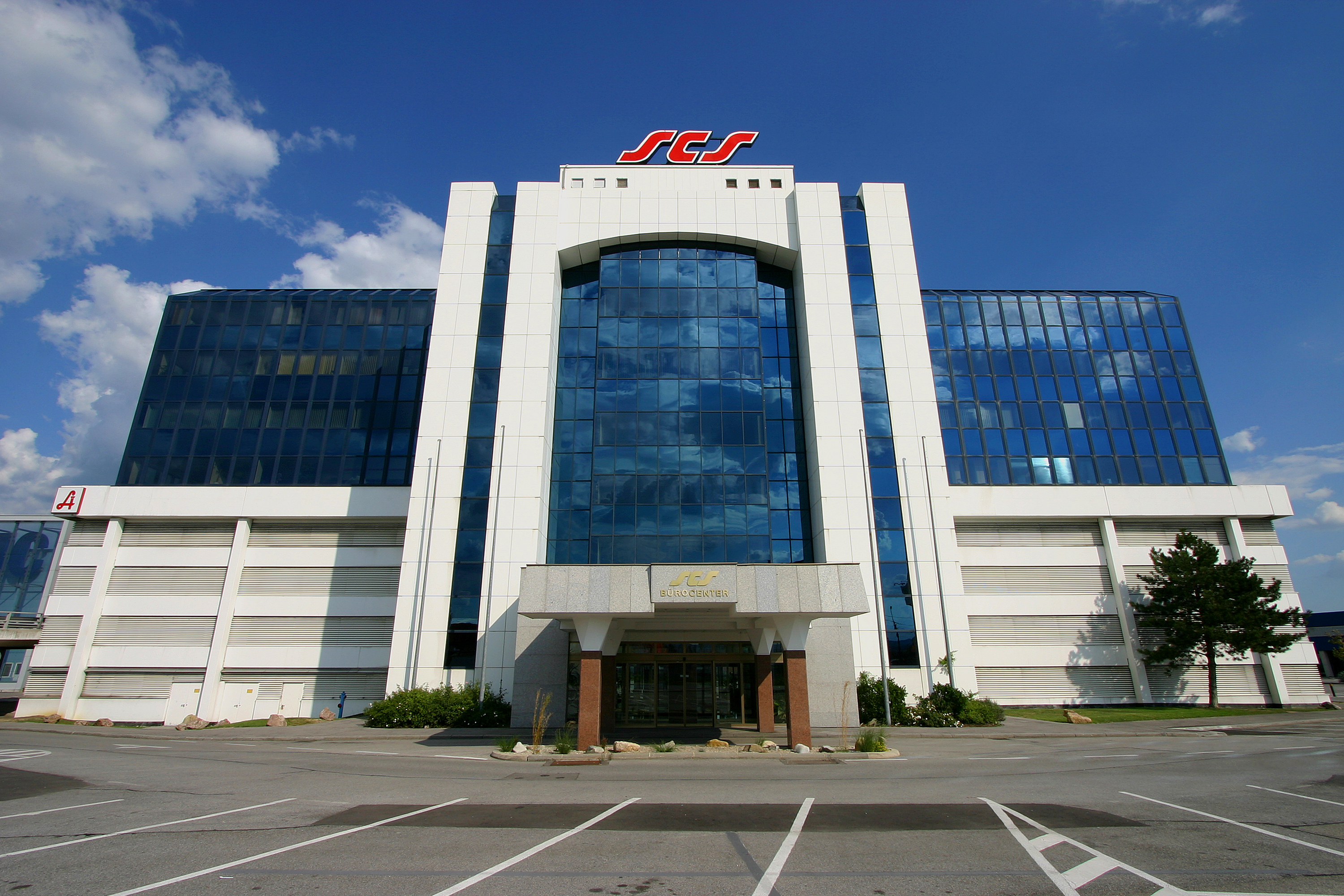 SCS Bürocenter - Teil der SCS is Vösendorf